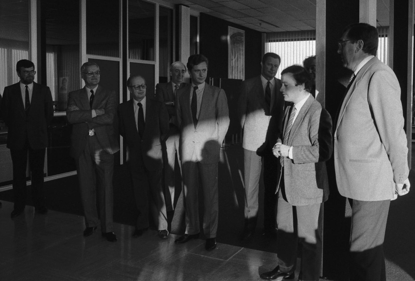 Pas de lieu. 23 février 1985. Vue d'un groupe de personnes dont Dominique Baudis pour remettre le prix Martini à Pierre Verdet.